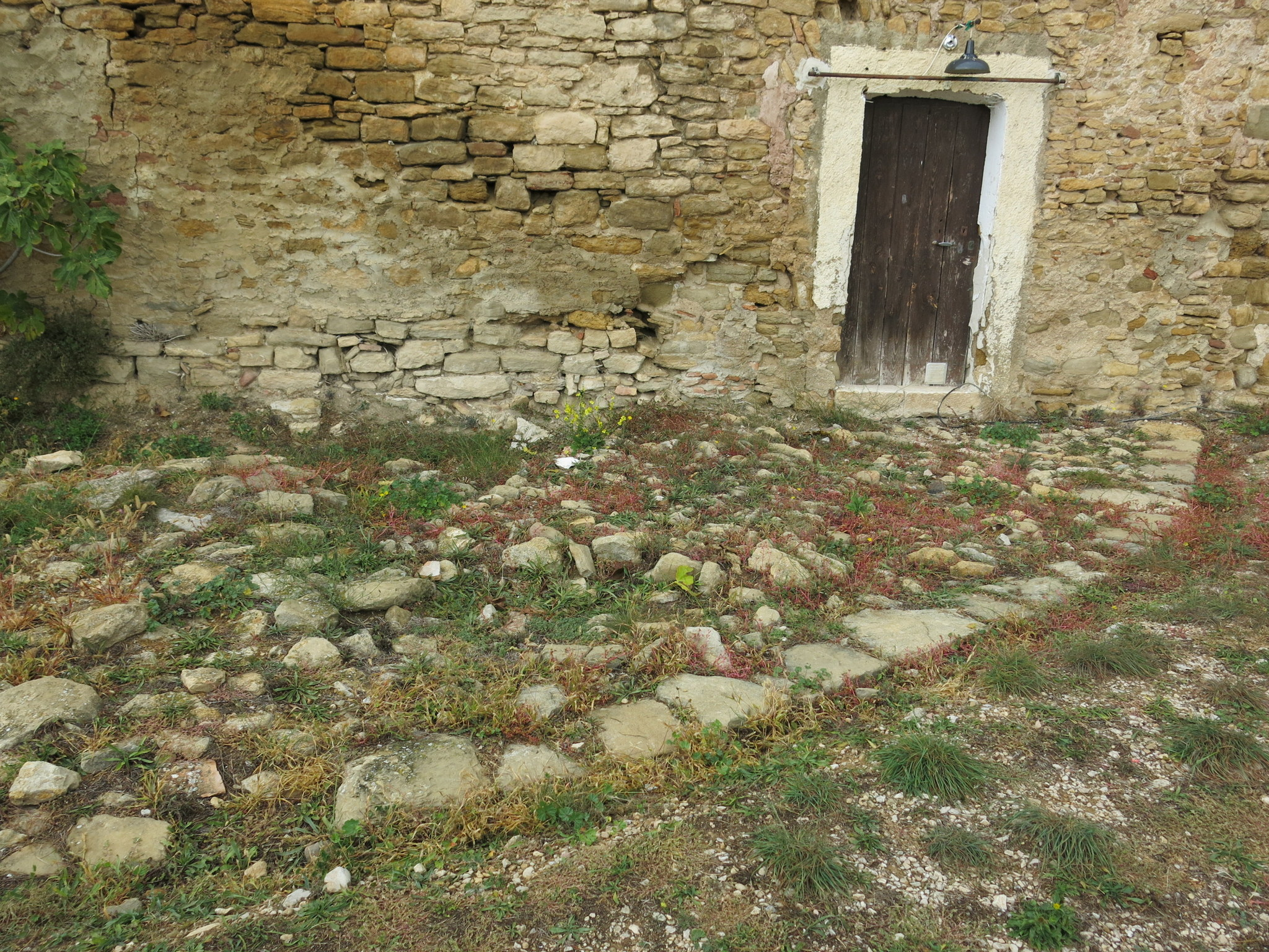 fonaments de la Gran Torre del castell d' Àger - Noguera / Catalunya